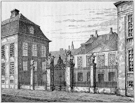 Frederiks hospital, Copenhagen, Denmark - facing Amaliegade